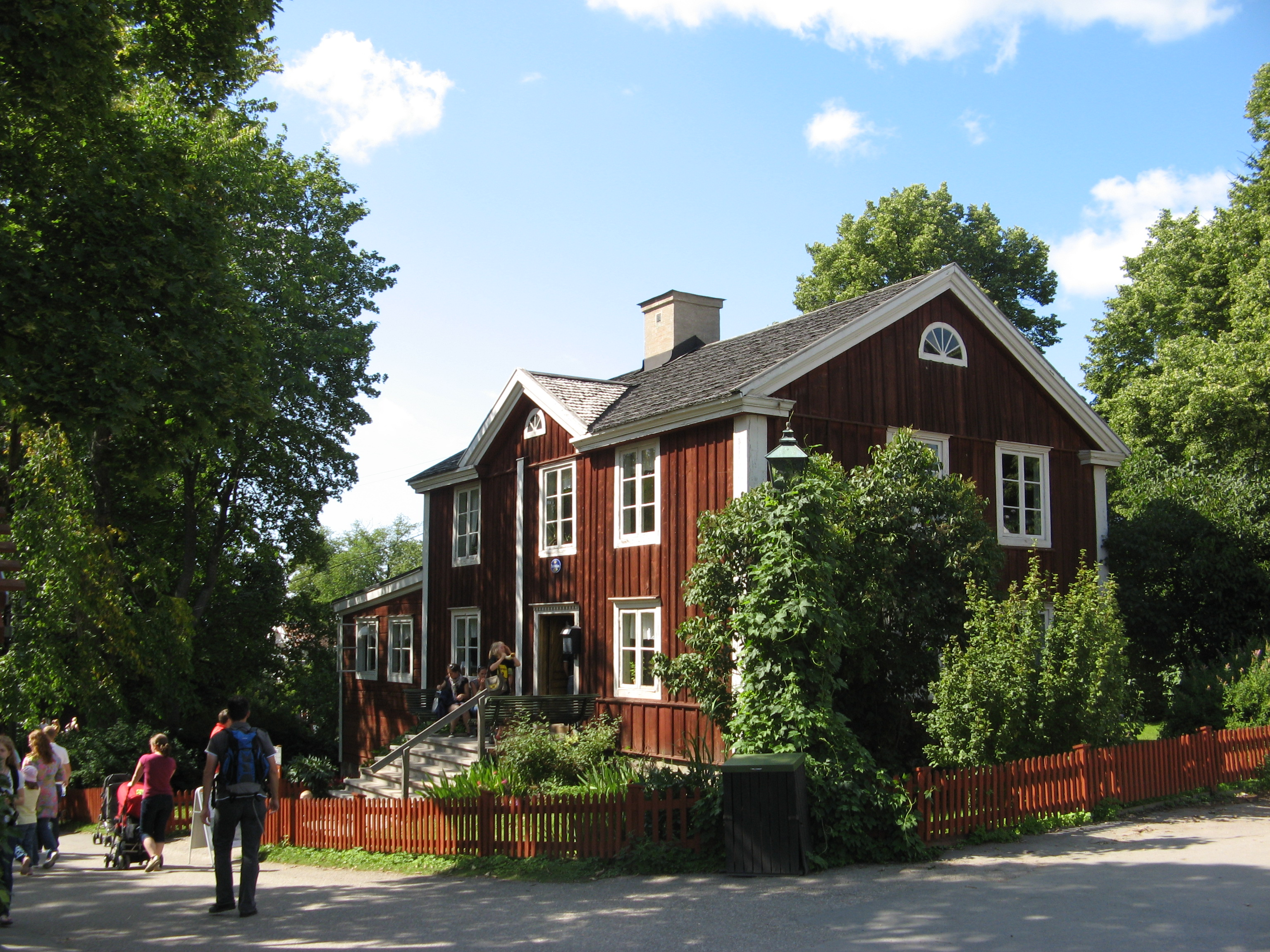 Posthuset, Skansen.